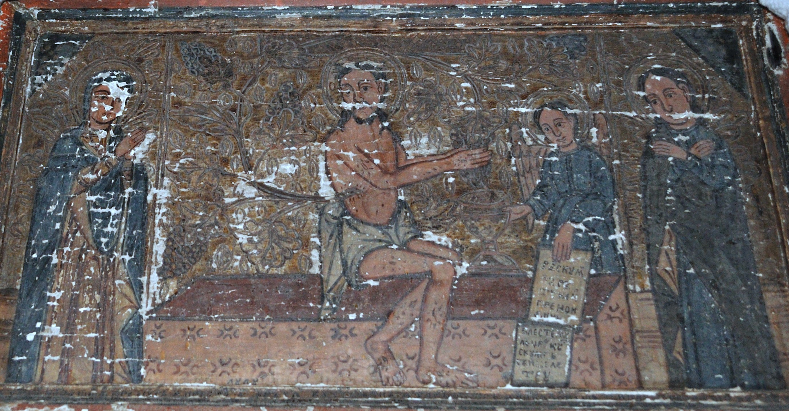 Biserica de lemn din Budești Susani, comuna Budești, județul Maramureș